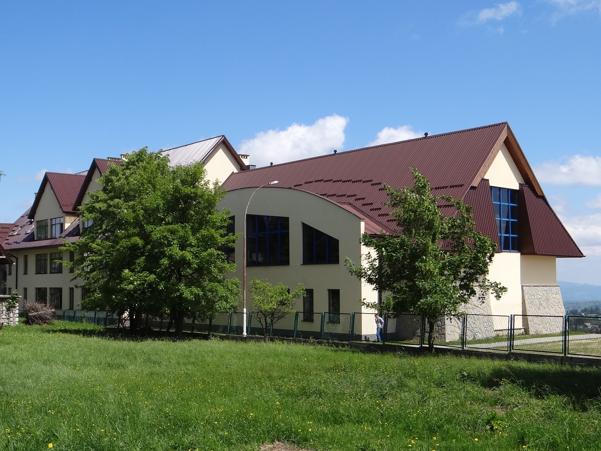 Szkoła we wsi Ząb